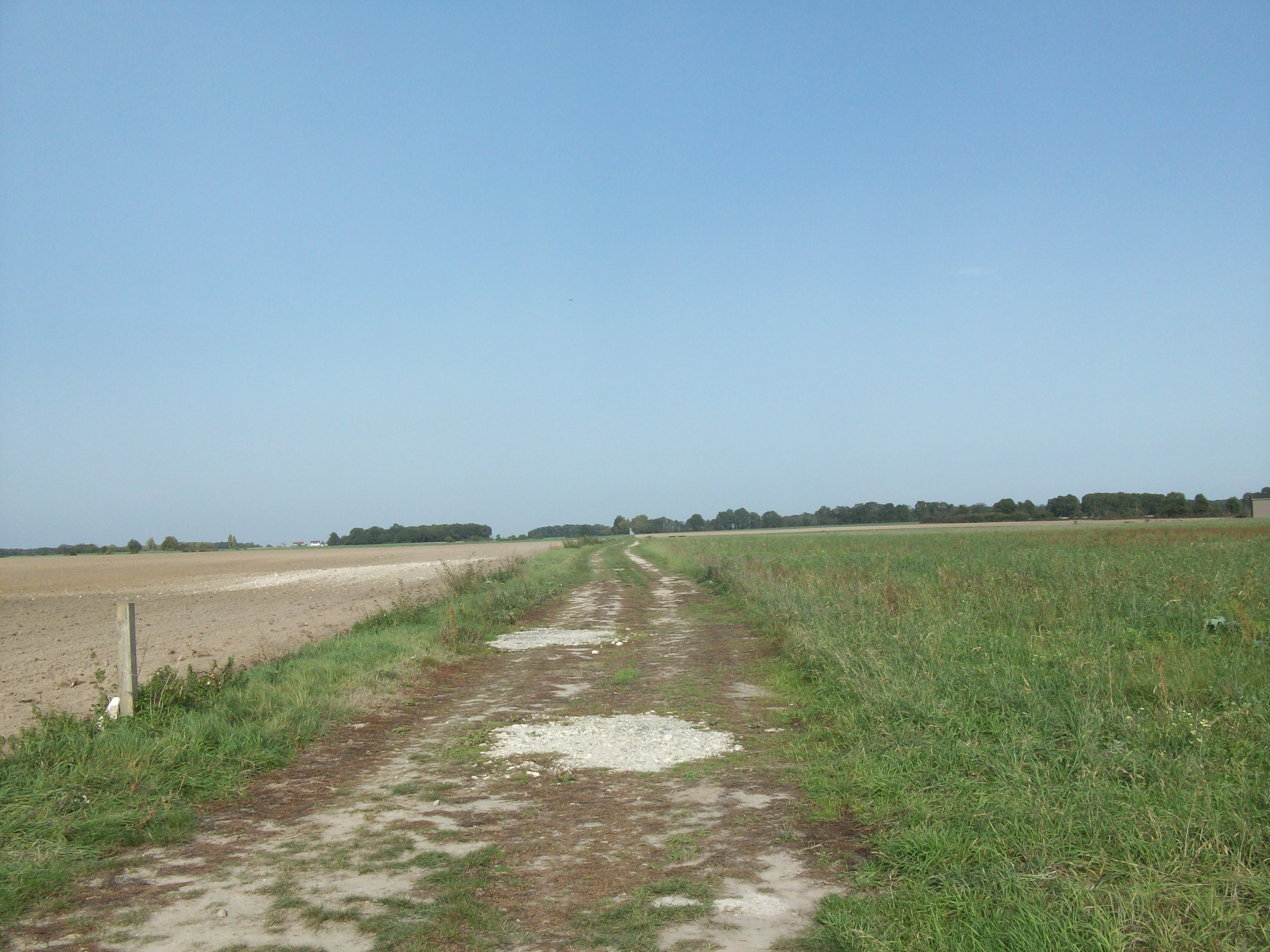 Chemin rural n°7 dit aussi chemin de de Saint-Jacques7 (une ancienne voie romaine?)